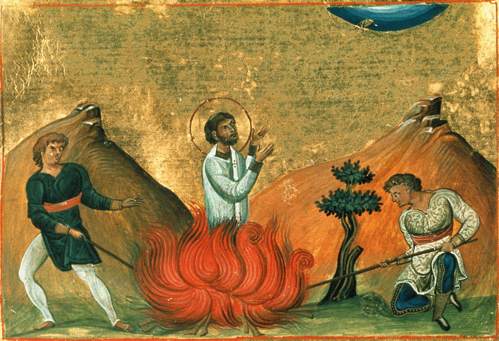 Мученик Авив Едесский Константинополь. 985 г. Миниатюра Минология Василия II. Ватиканская библиотека. Рим.